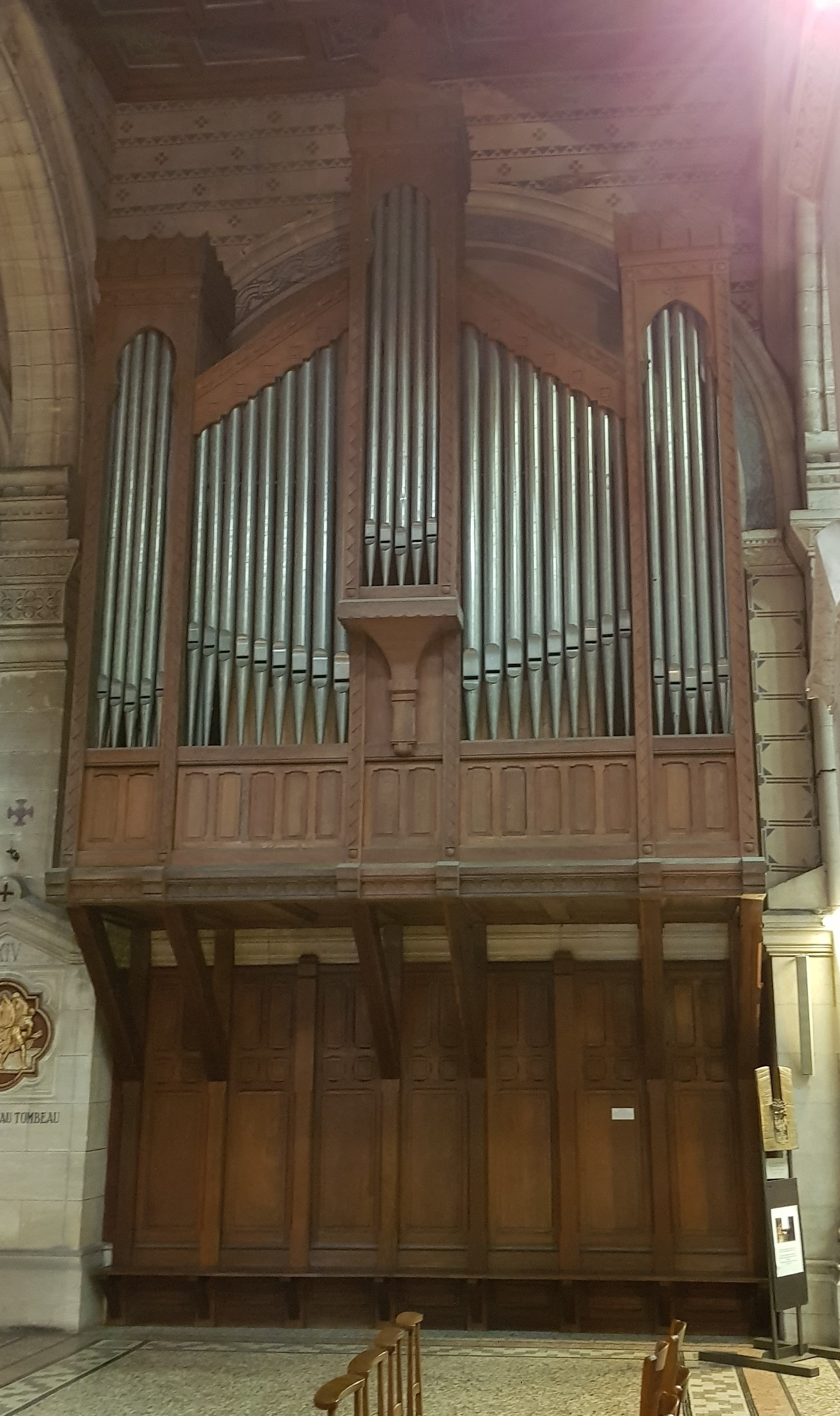 Orgue de choeur, de la basilique Notre-Dame de Brebières à Albert (Somme, France)